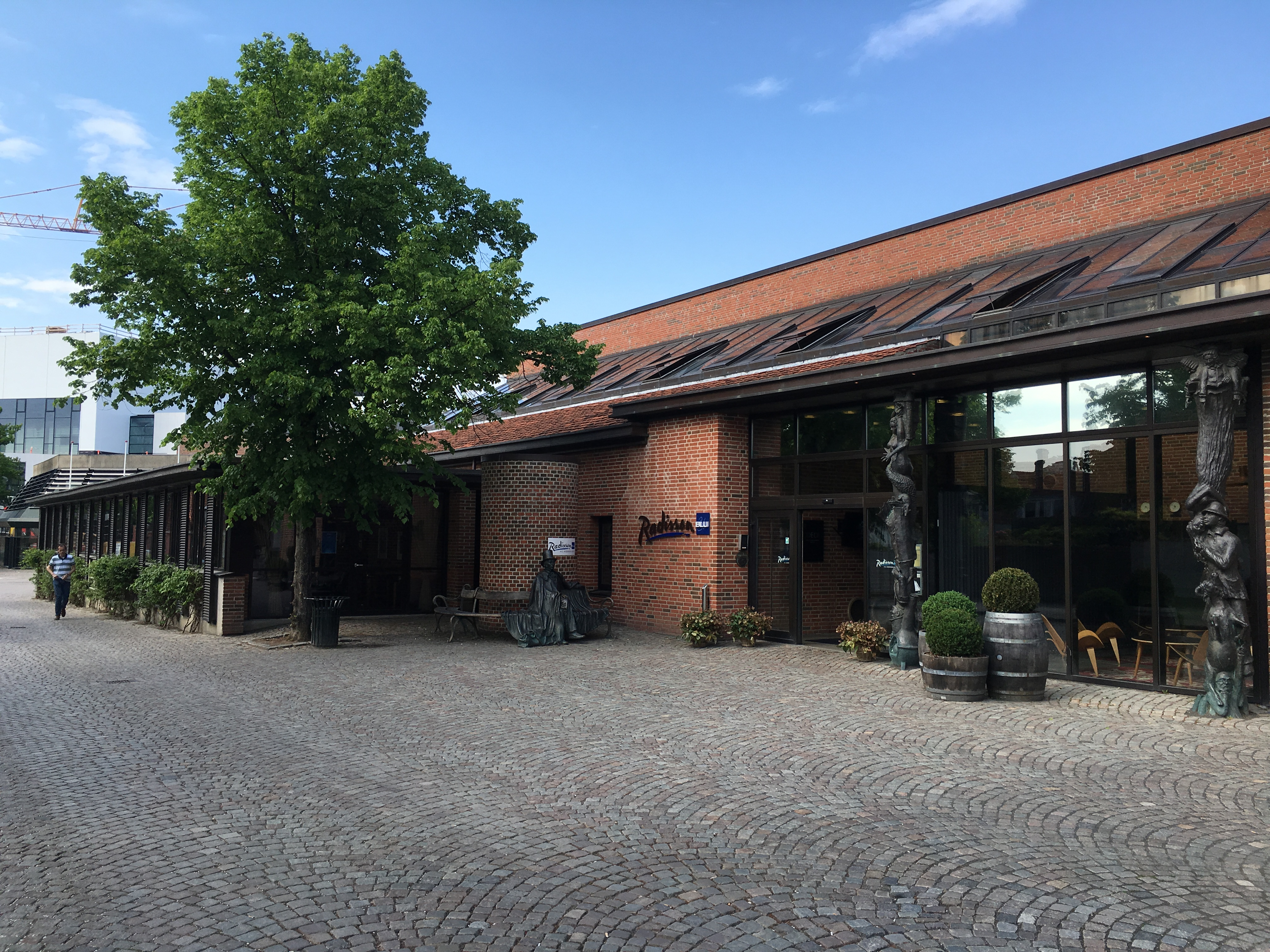 Radisson Blu H.C. Andersen Hotel, Odense, DK